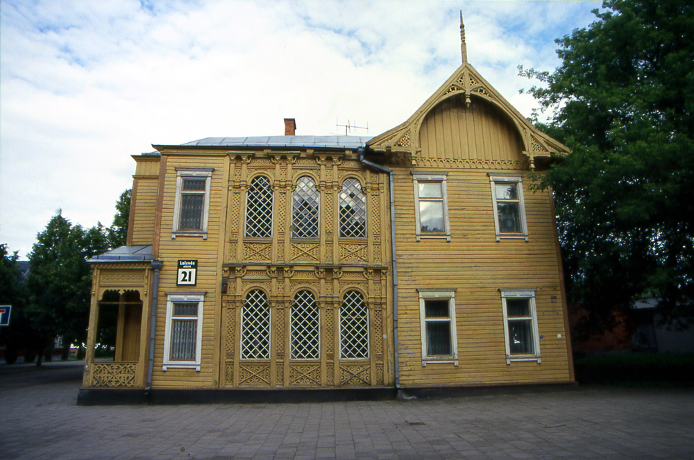 Druskienniki Spa